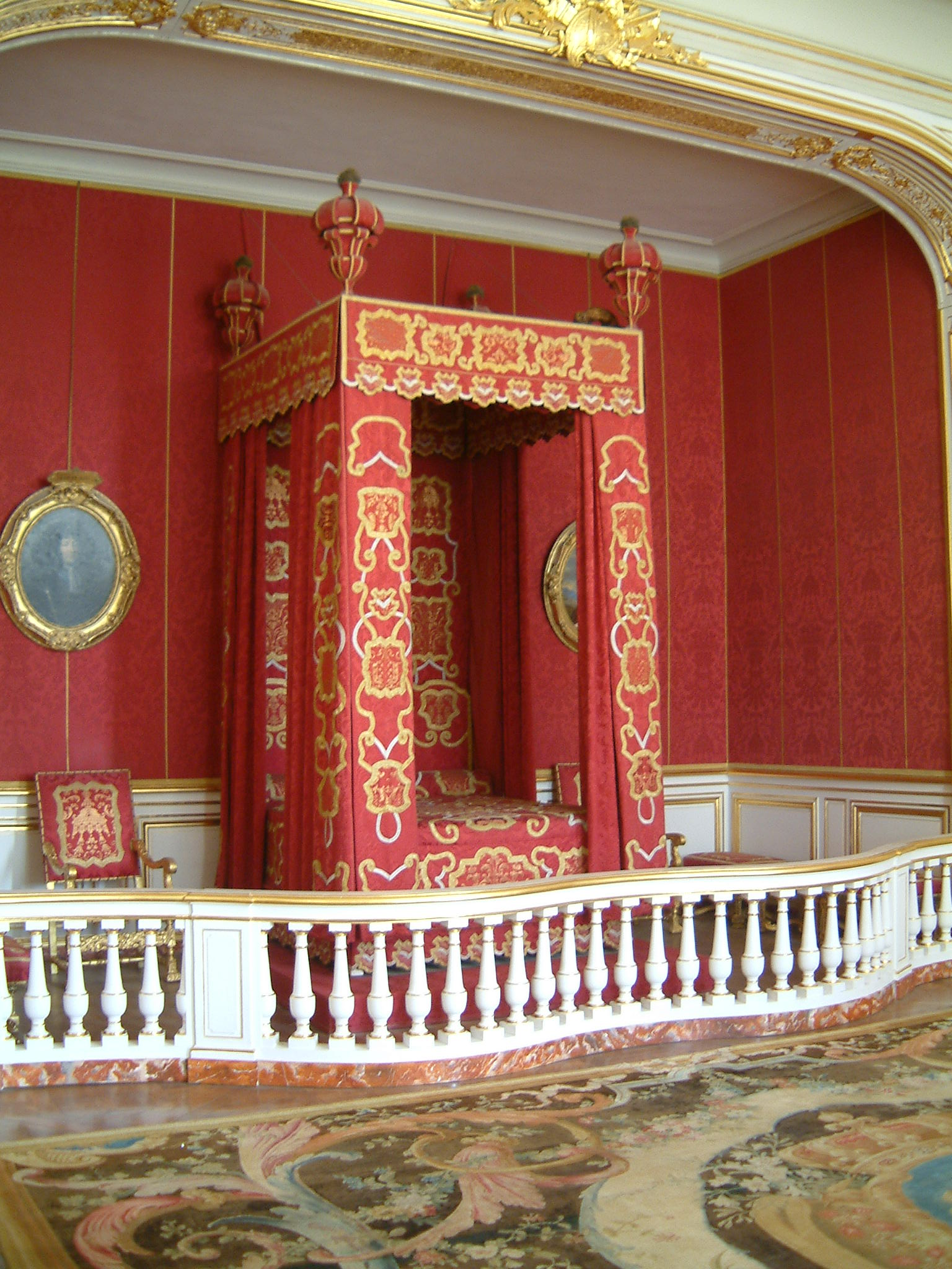 Château de Chambord, Chambord, FRANCE